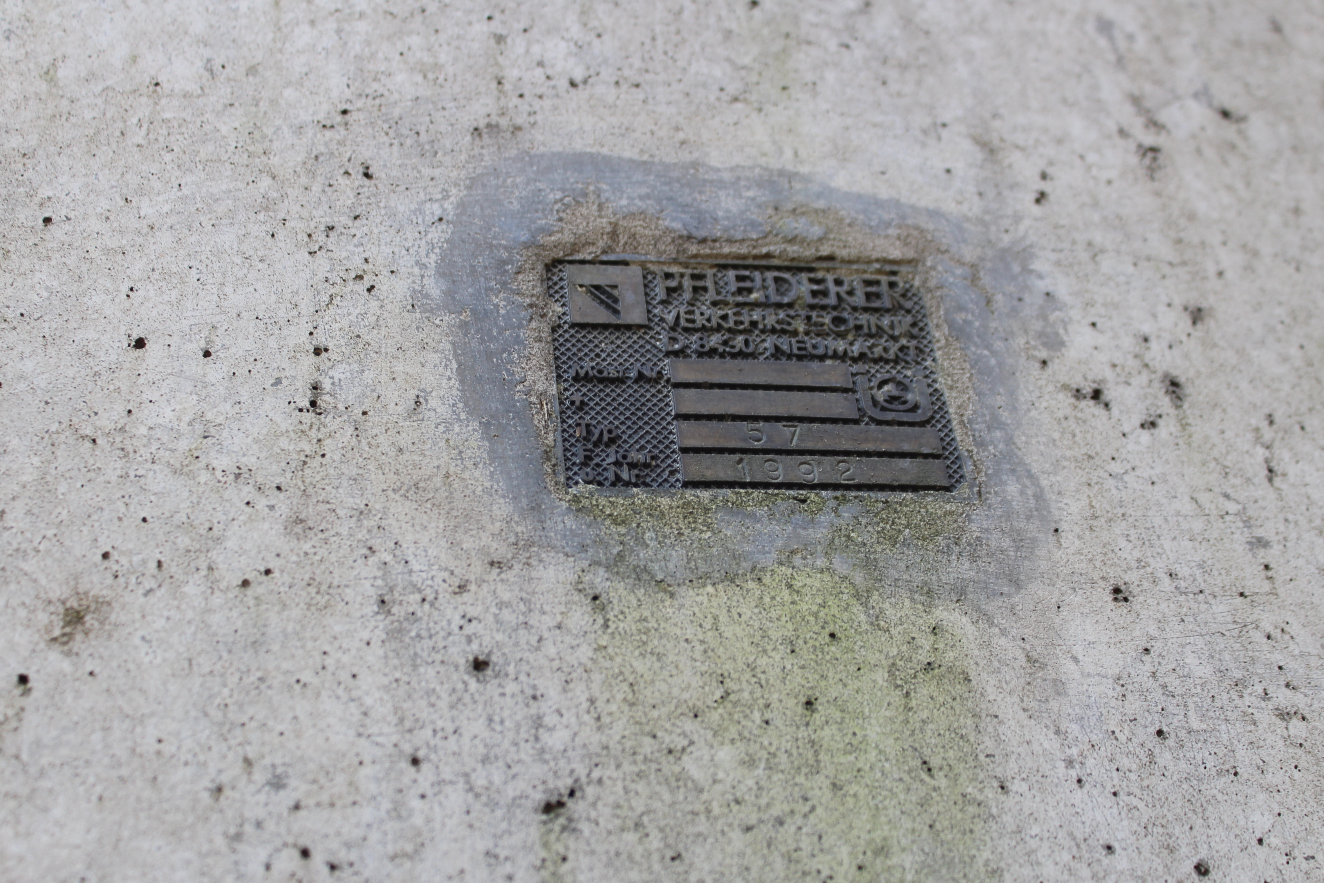 Typenschild am Sendeturm Bad Brückenau